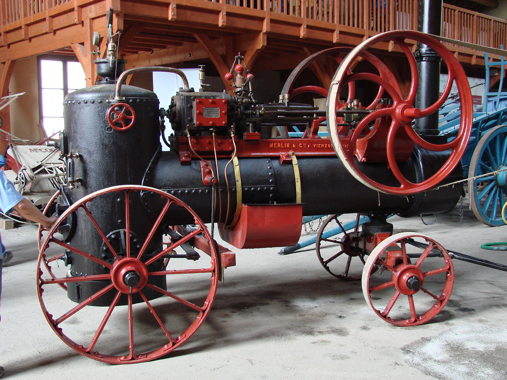 Locomobile